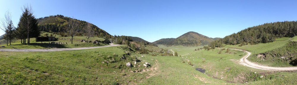 Plateau de Boum situé près du village de Comus et des gorges de la Frau dans l'Aude